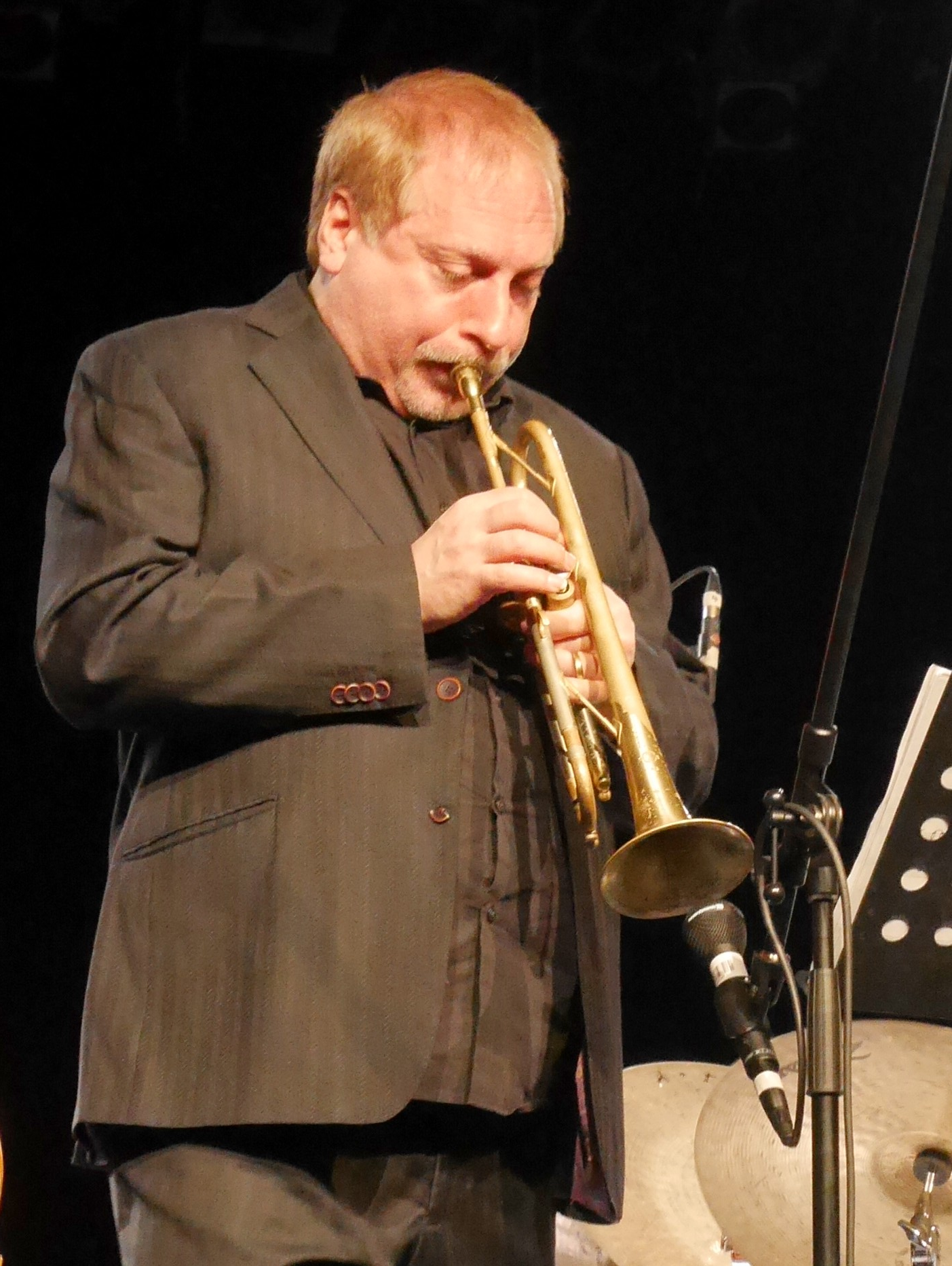 David Weiss, The Cookers Nice 2016